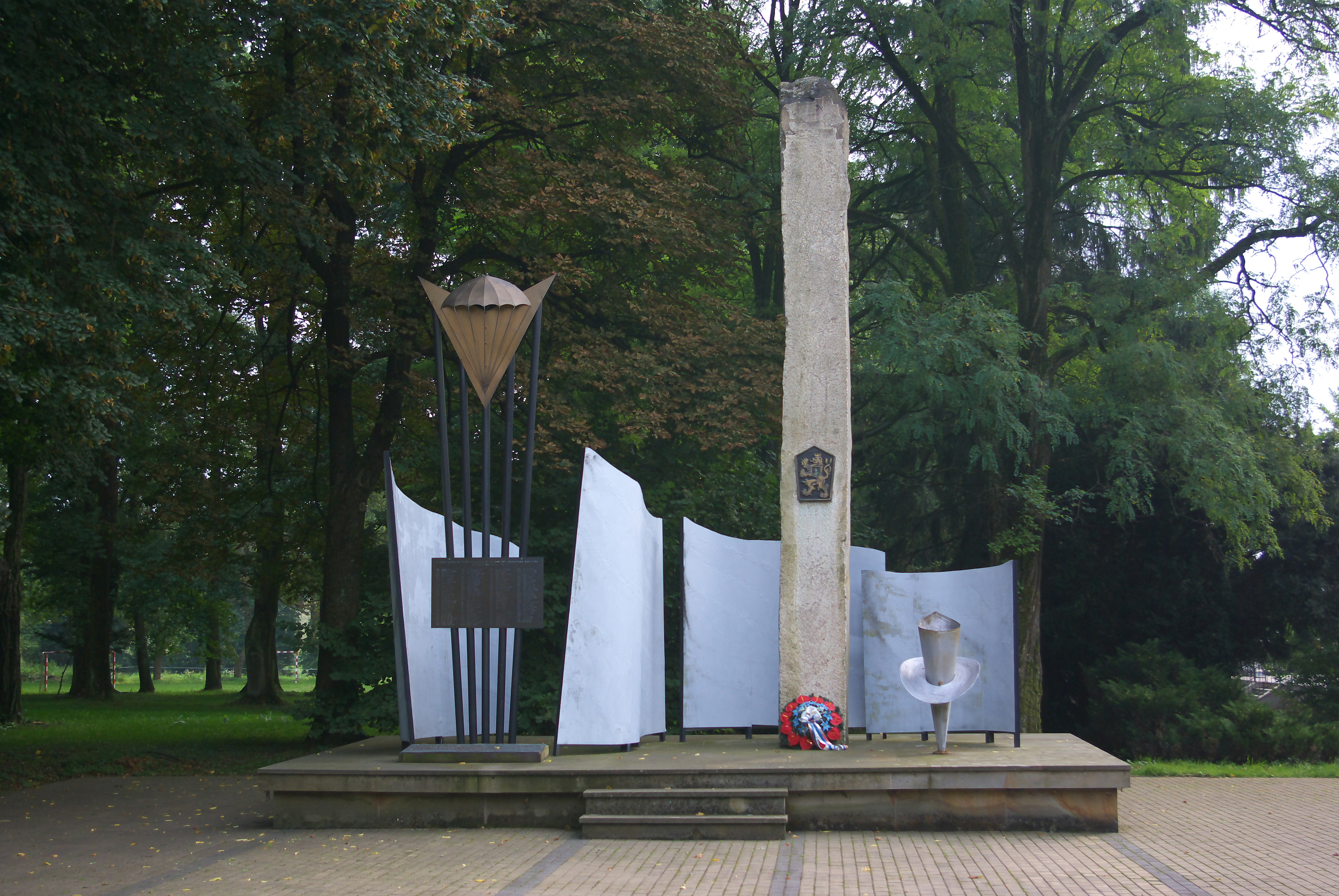 Masowa mogiła i pomnik żołnierzy II Samodzielnej Czechosłowackiej Brygady Spadochronowej w Nowosielcach (1944). Pomnik z 1972.